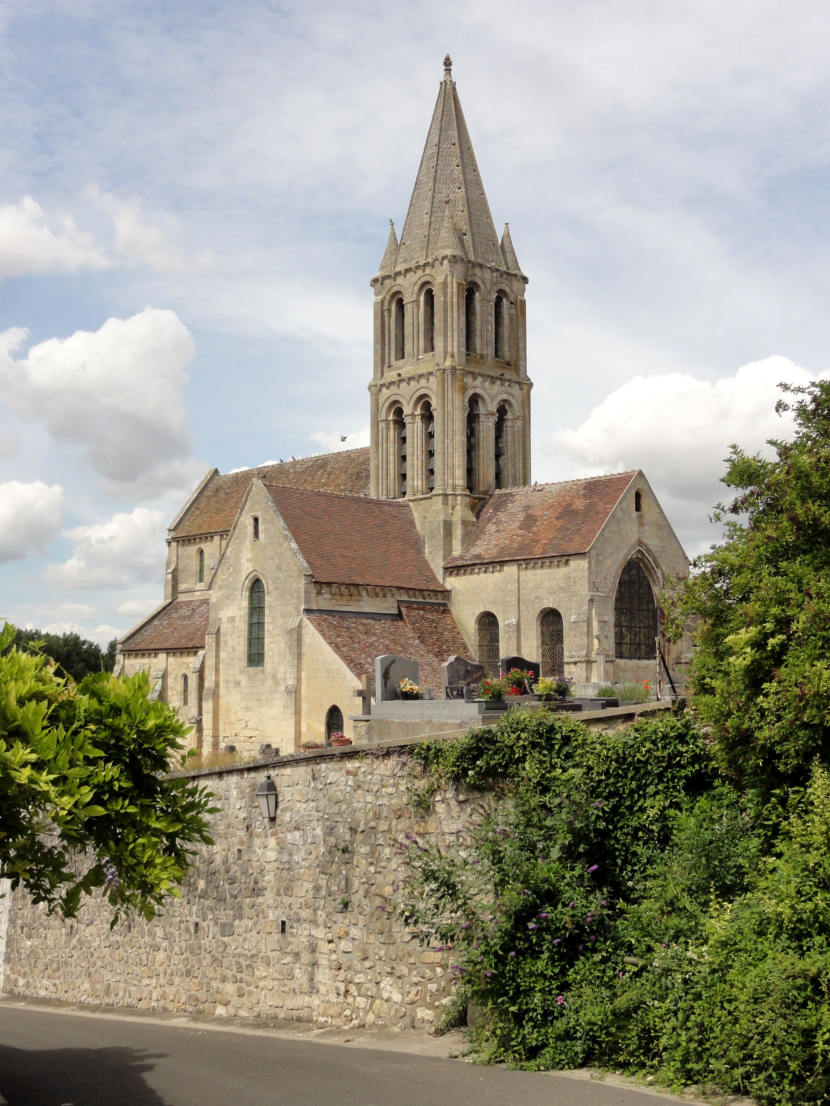 Vue depuis le sud-est.